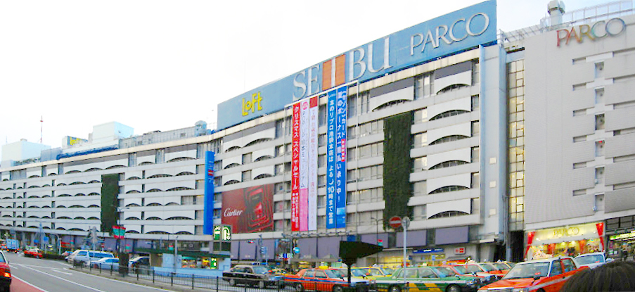 西武池袋駅=西武百貨店池袋本店（池袋西武）の外観。横長のビルとしては日本最長でギネスブックにも載ったほどである（JR池袋駅=PARCOと組み合わせるとほぼ全部である）。